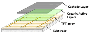 Dit is een weergave van hoe een AMOLED scherm opgebouwd is.